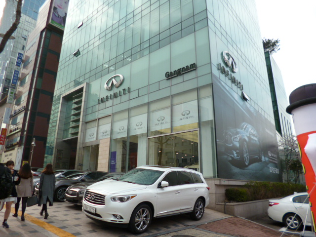 韓国日産株式会社